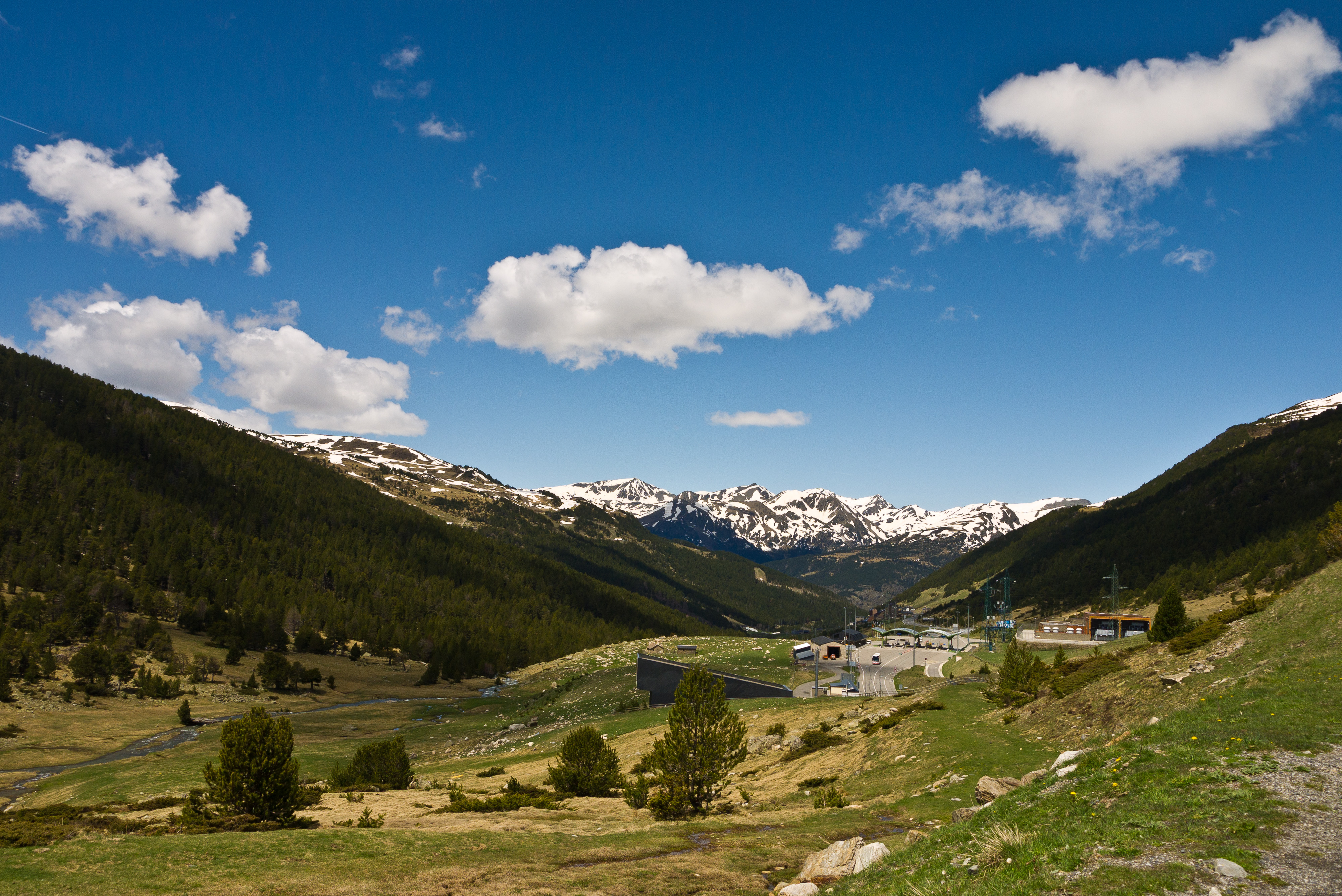 Riu Valira d'Orient. Entrée du tunnel d'Envalira.